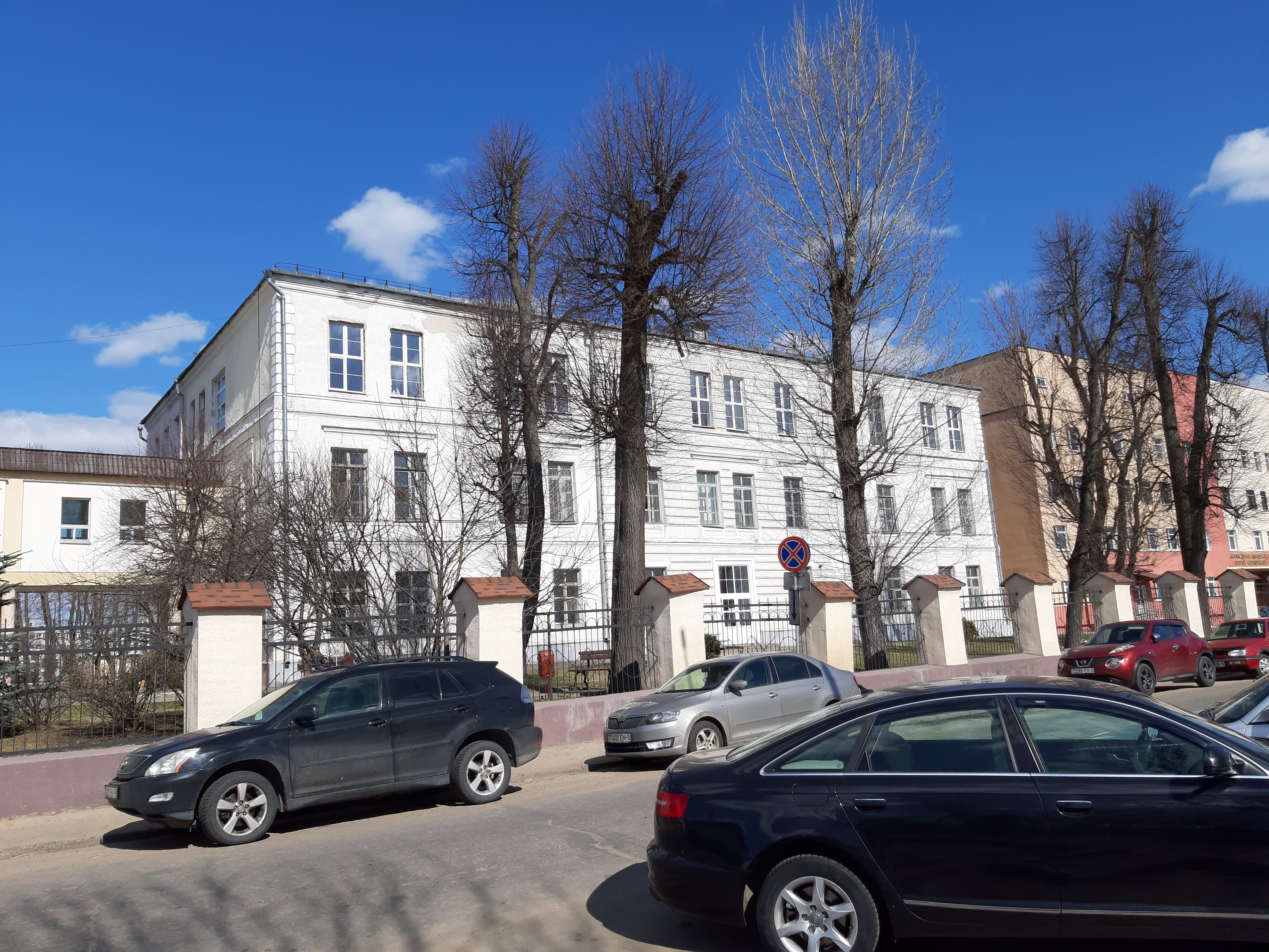 Магілёў. Між Ленінскай і Боткіна